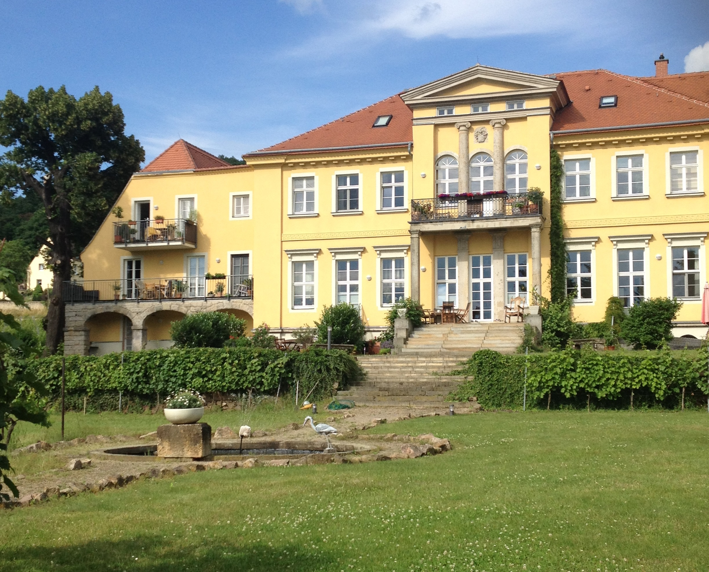 Radebeul Paulsberg Rundbecken mit Plastikreiher